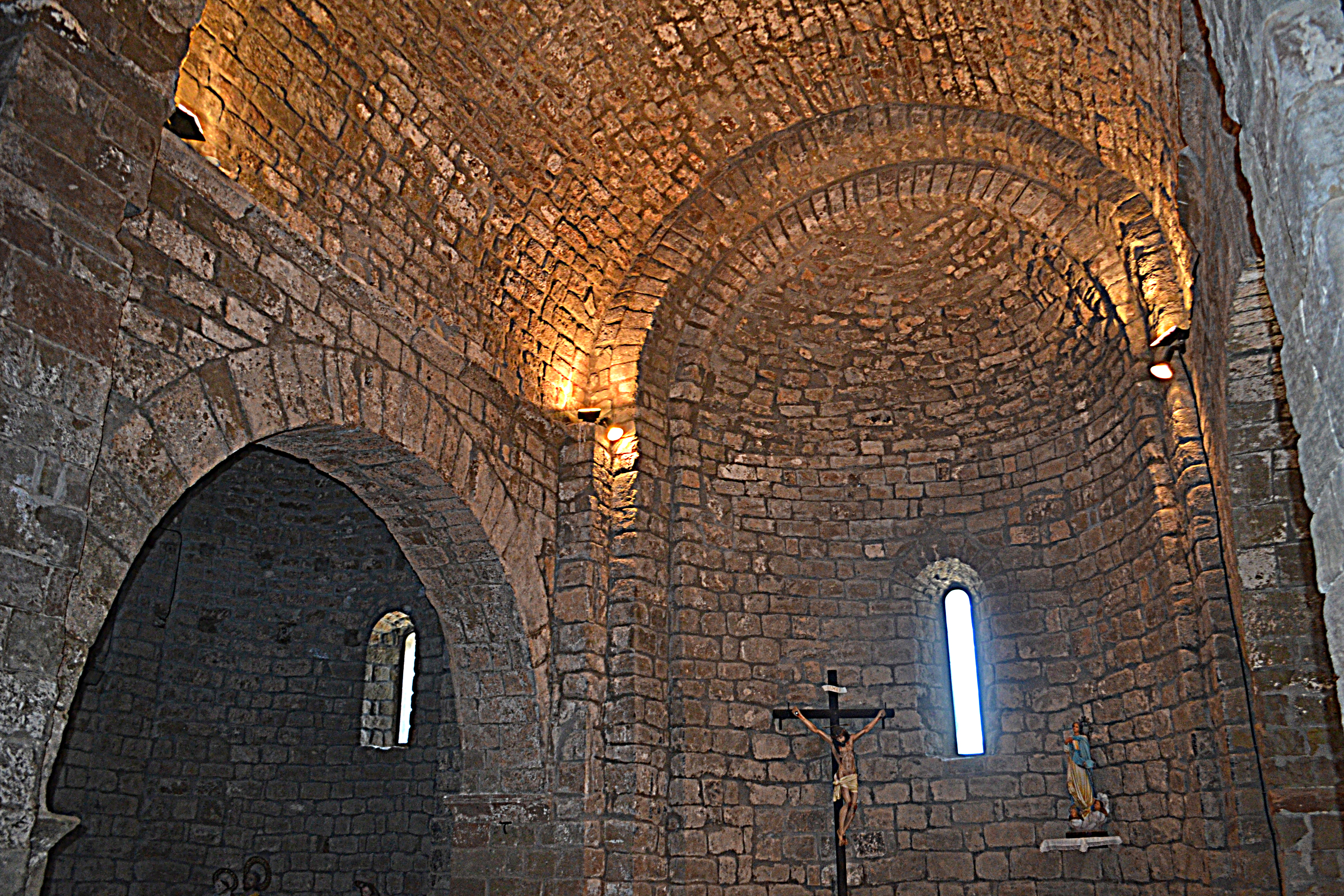 Església de Sant Pere de Talteüll (Massoteres)